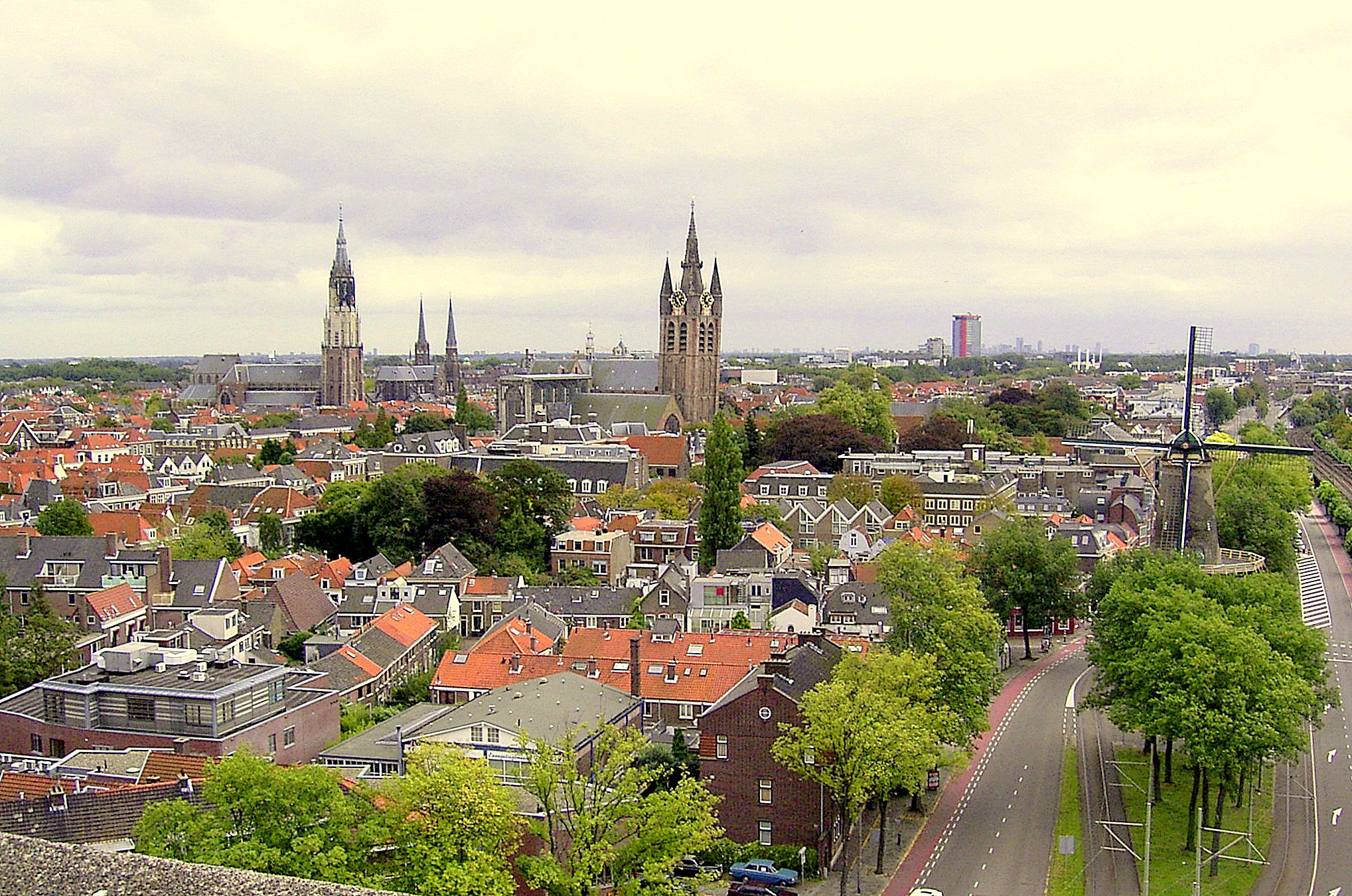 the newe and old church and the rose (windmill), delft